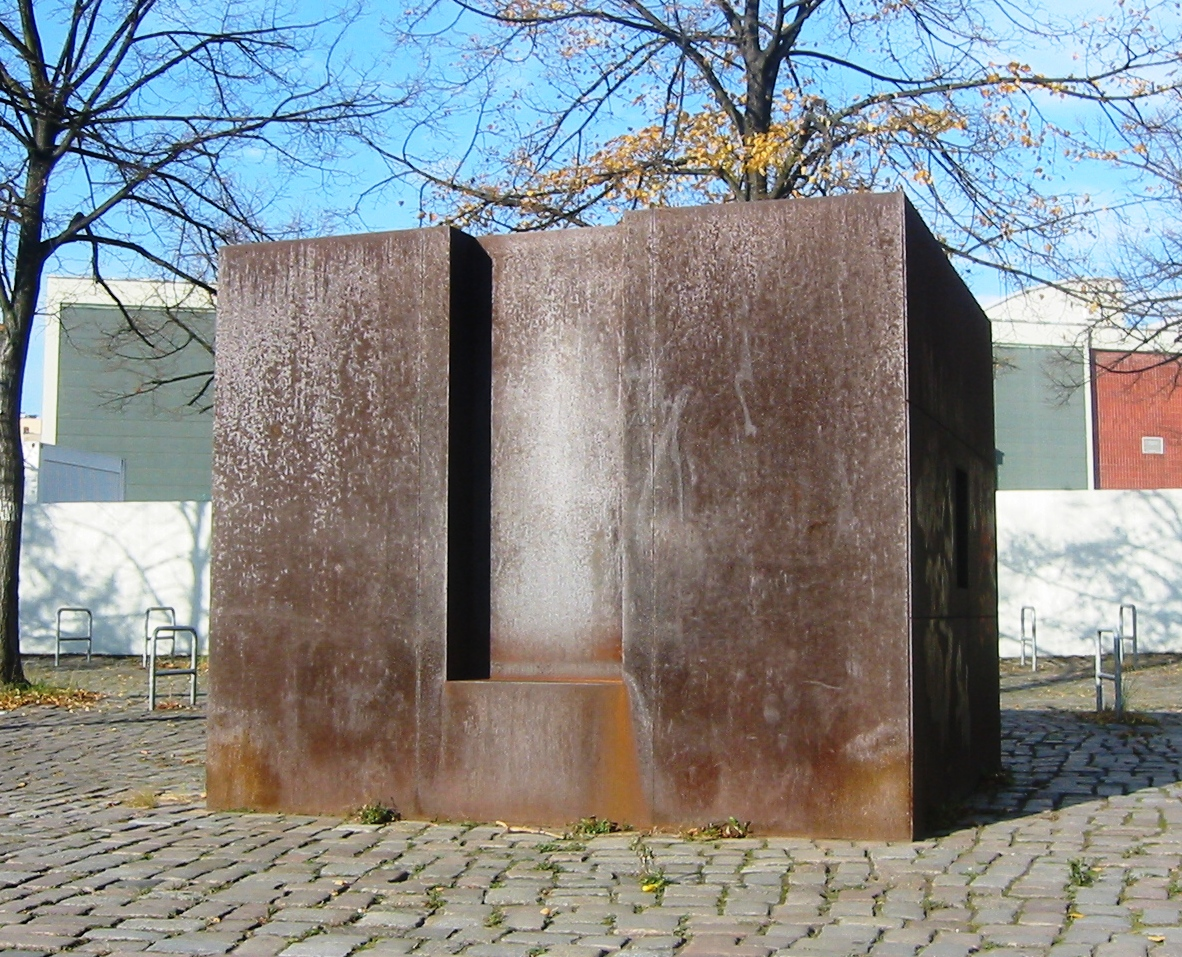 Status „Nobody“ von Micha Ullman in der Lindenstraße in Berlin-Kreuzberg